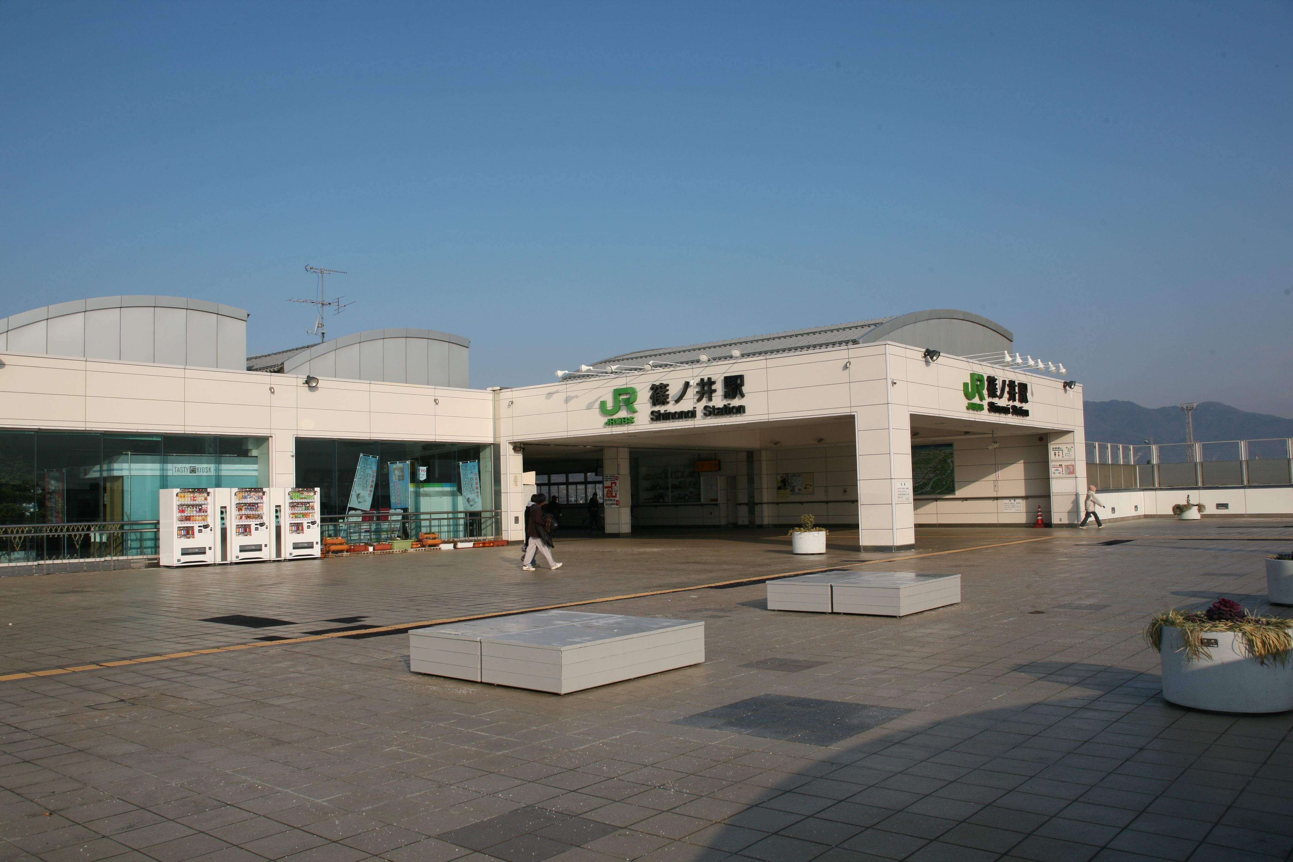 篠ノ井駅